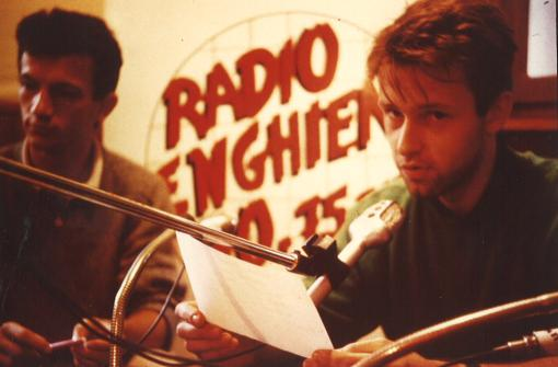 De 1985 à 1987, Frédéric Fougerat, étudiant en droit, anime avec Gilles Payet, étudiant en sciences économiques, l'émission "Initiative Emploi" chaque samedi matin sur l'orientation scolaire et l'emploi des jeunes.